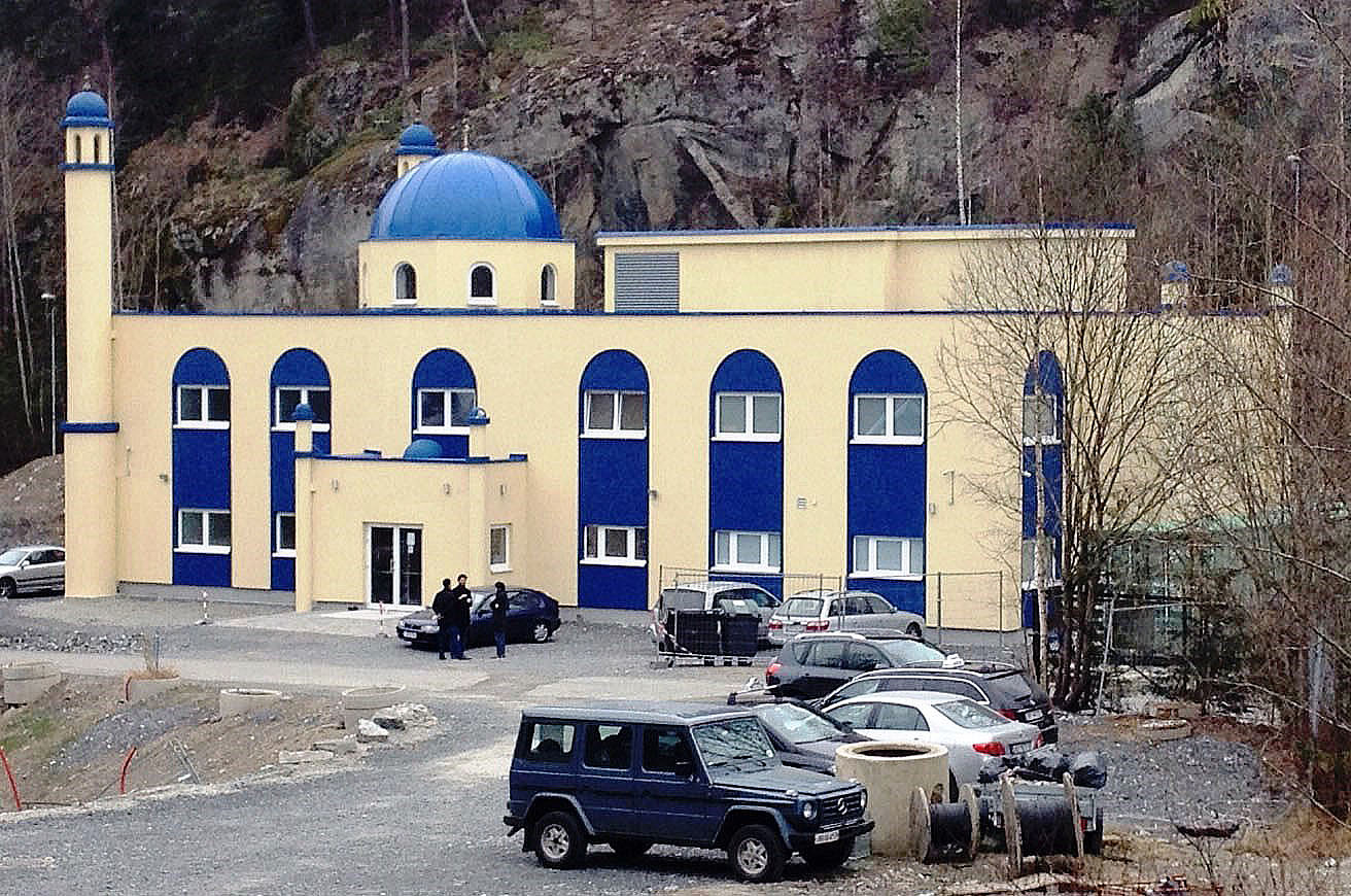 Tauheed Islamic Centres moske i Prinsdal, Oslo, mars 2014. Uteområdet er ennå ikke ferdig opparbeidet.